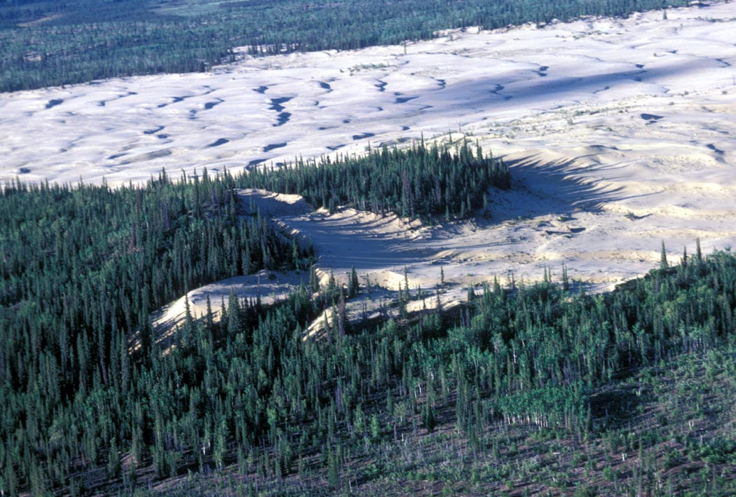 Nogahabara sand dunes, Koyukuk National Wildlife Refuge